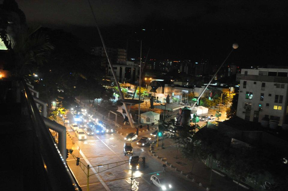 Las Mercedes Caracas - Venezuela